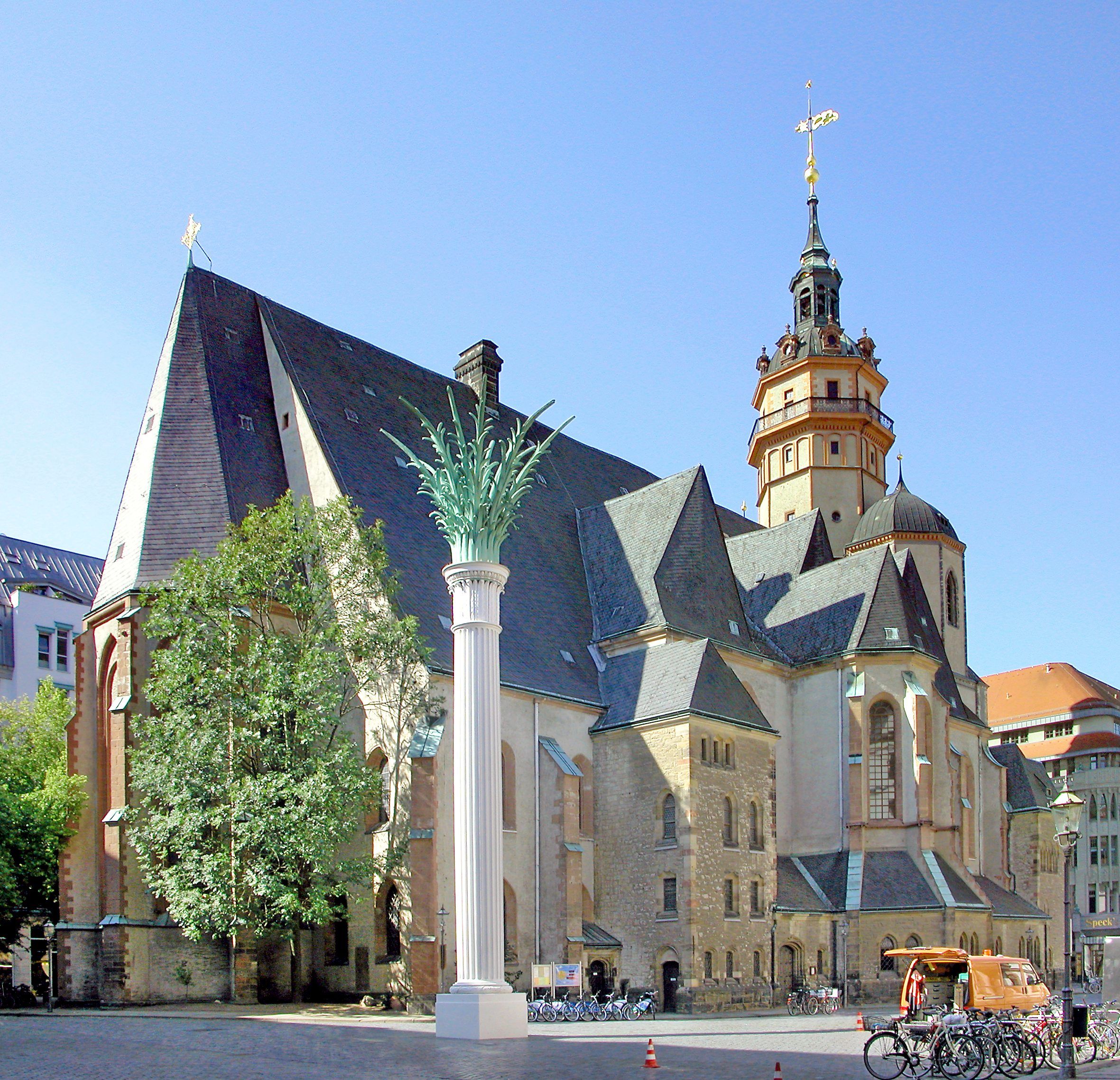 08.09.2009 04109 Leipzig, Nikolaikirchhof: Nikolaikirche (GMP: 51.340321,12.378483). Die Stadt- und Pfarrkirche St. Nikolai wurde um 1165 gegründet. Anfang des 16. Jahrhunderts erweitert zur spätgotischen Hallenkirche. Das bestimmt noch heute ihr Äußeres. Die drei Türme erhielten ihre letzte, barocke Gestaltung 1731. Davor die Nikolaisäule (GMP: 51.340507,12.379078). Mit dem Entwurf will der Leipziger Künstler Andreas Stötzner an die Friedensgebete und Montagsdemonstrationen des Herbstes 1989 erinnern. Die Ausführung der Säule und Gestaltung der Bodenplatte realisierte der Leipziger Bildhauer Markus Gläser. Am 9. Oktober 1999 wurde das Denkmal eingeweiht. [DSCN38872-38873.TIF]20090908160MDR.JPG(c)Blobelt